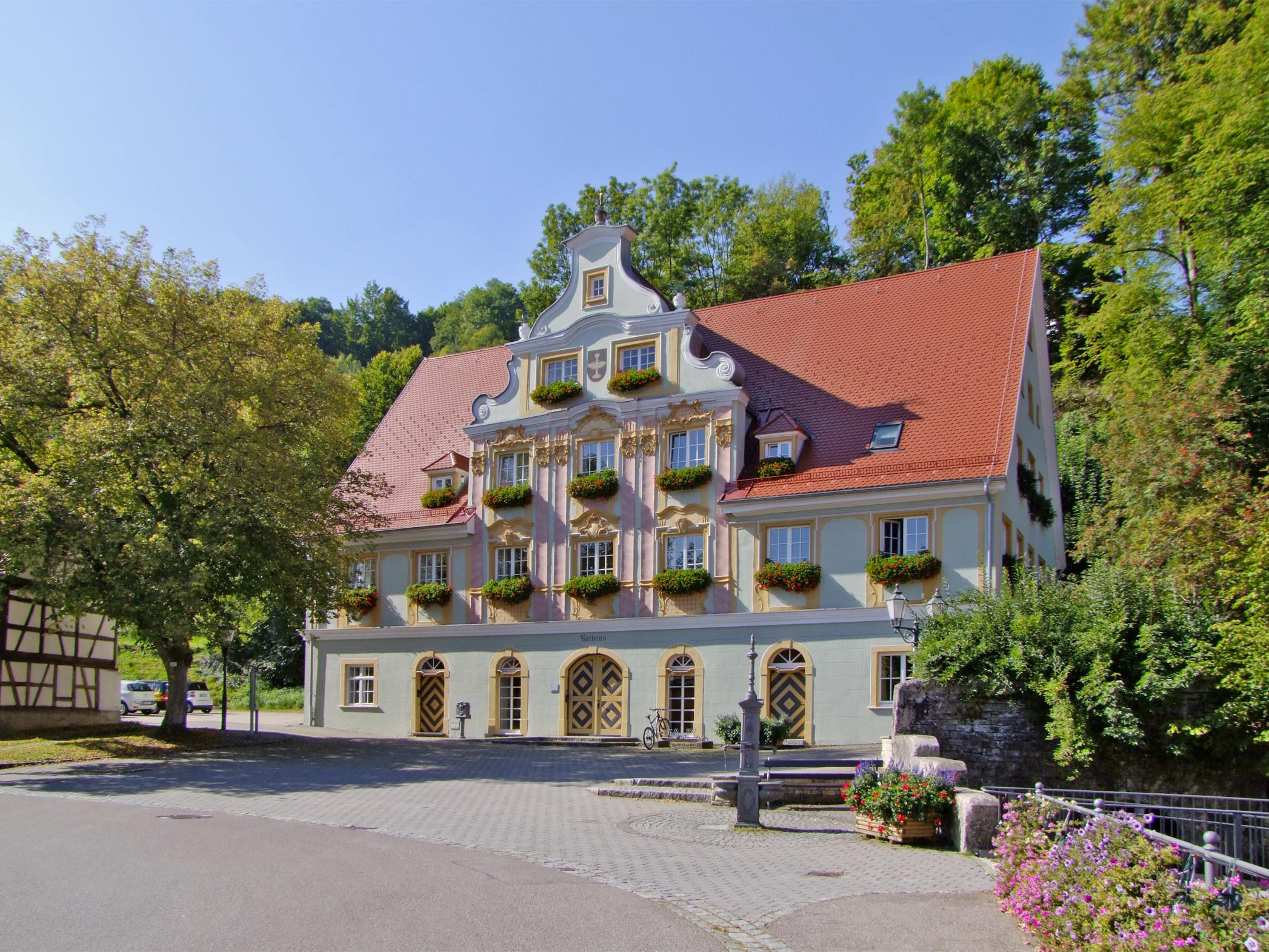 Das Gebäude entstand in seiner jetzigen Größe 1722 und war Wohnhaus, Brauerei und Wirtschaft „Zum Goldenen Löwen“. Der wohlhabende Besitzer Johann Georg Blezinger (1717-1795) ließ 1775 die Frontseite von einem unbekannten Künstler mit einem Rokoko-Schaugiebel versehen, so dass die Bevölkerung das Haus scherzhaft als „Blezinger-Palais“ bezeichnete. Blezinger war ein bedeutender Unternehmer besonders im Bereich der Verhüttungs- und Eisenindustrie Württembergs. Seit 1885 ist das Gebäude das Rathaus der Gemeinde Königsbronn.